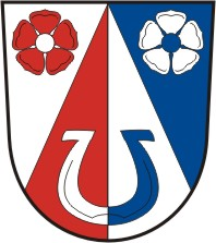 Slapy, okres Tábor